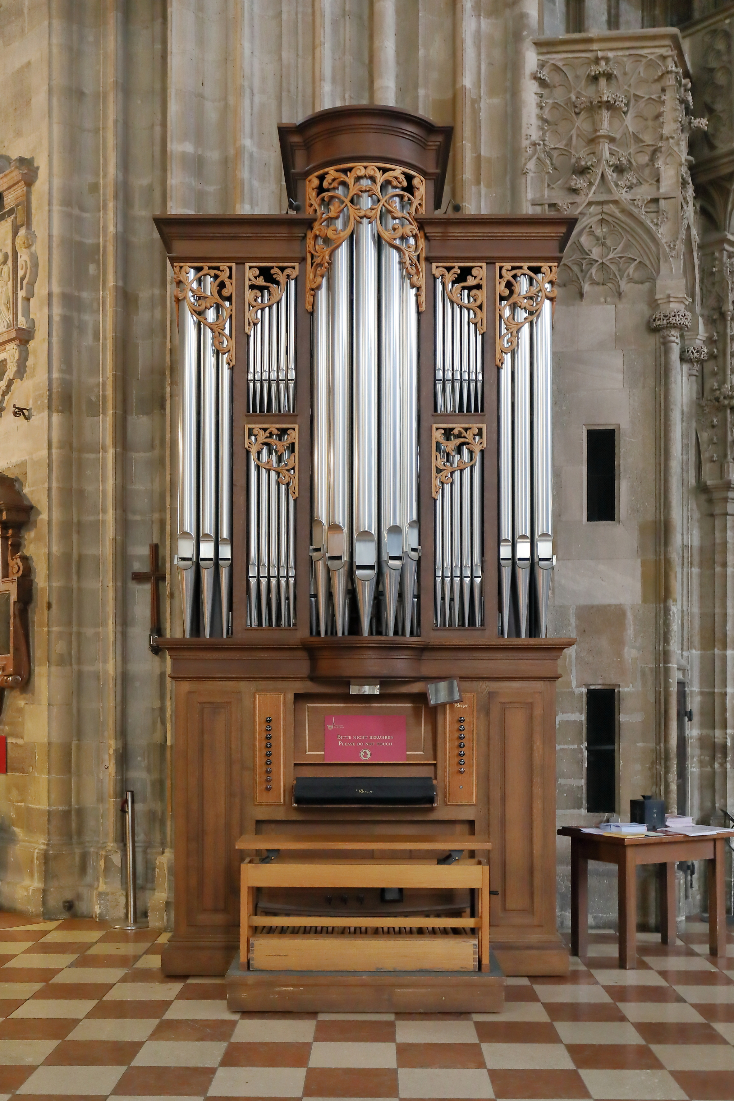 Die sogenannte Haydn-Orgel im rechten Seitenschiff des Stephansdoms in der österreichischen Bundeshauptstadt Wien.Die Orgel mit zwölf Registern auf zwei Manualen und Pedal wurde von der Orgelbaufirma Rieger anlässlich dem 200. Todestag von Joseph Haydn gefertigt und am 24. Oktober 2009 eingeweiht.